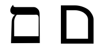 hebrew letter final mem